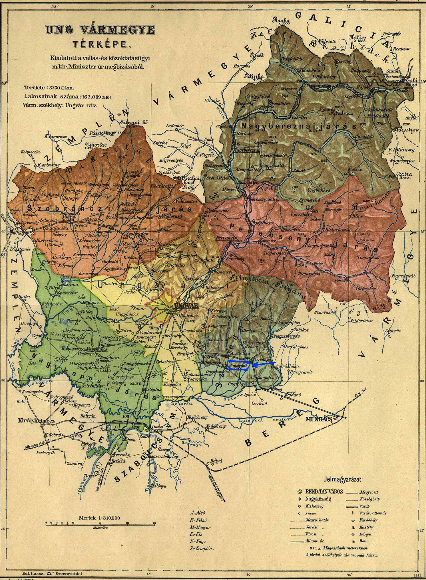 c. Вовкове -Унгордаш ( Ungordas ) на карті періоду Австро-Угорщини